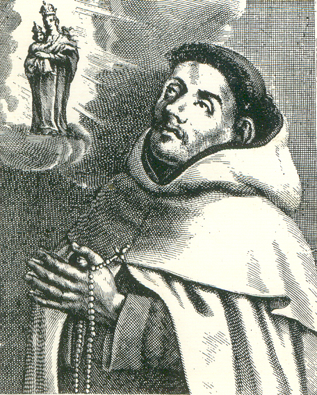 Grabado Flamenco de Ricardo Colin, siglo XVI